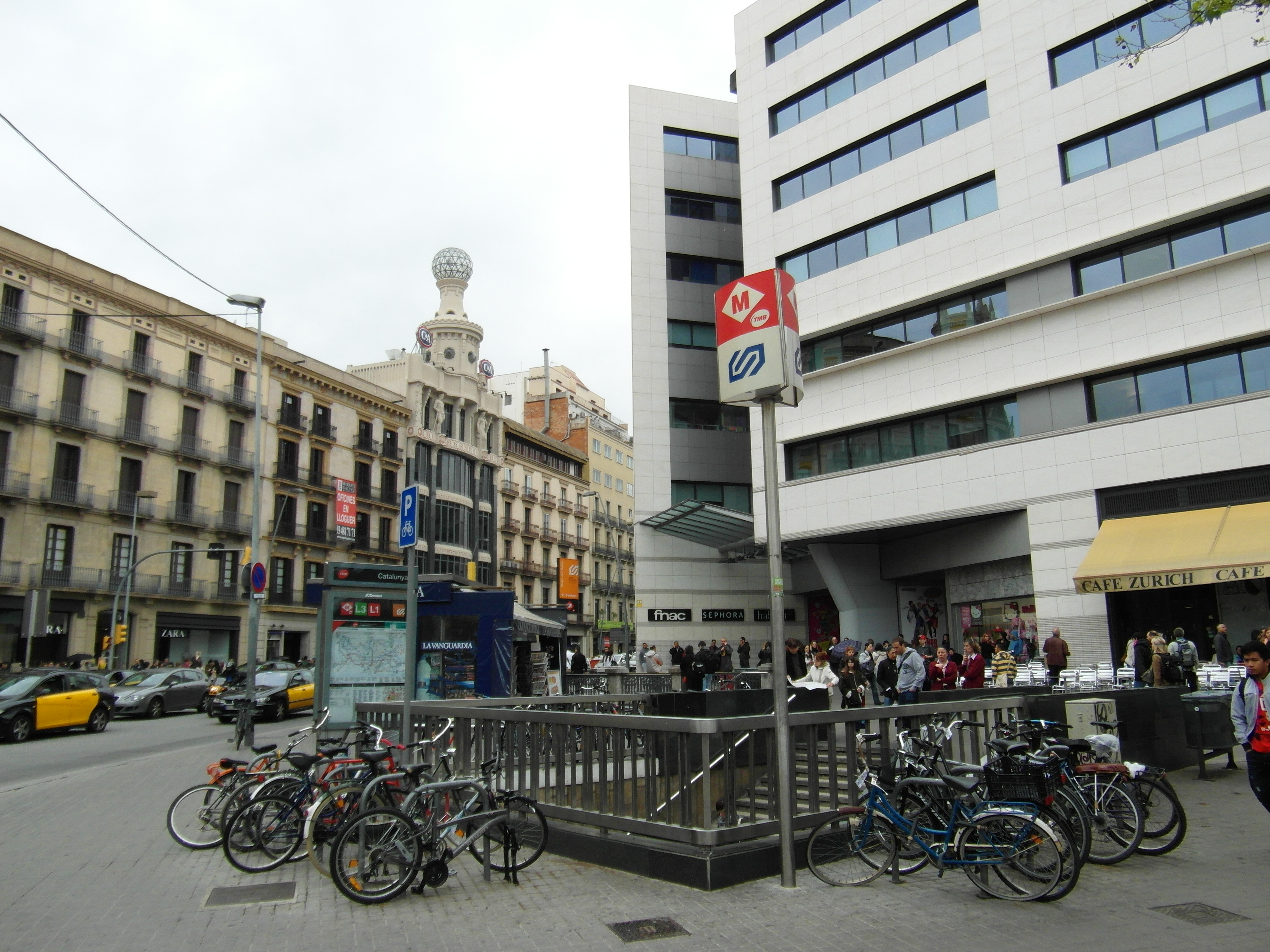 Barcelona - Estació de Plaça de Catalunya